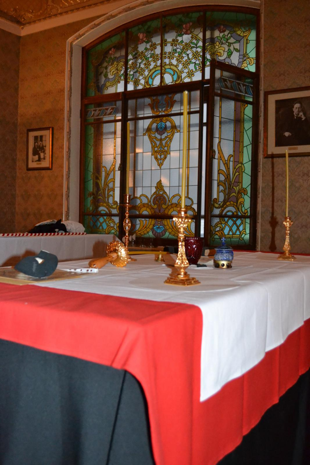 Мартинистский алтарь, фотография с собрания лож Суверенного и Автономного Древнего Ордена Мартинистов-Мартинезистов, отель Метрополь, Москва, Россия, апрель 2013 года. (По другим данным — любительская реконструкция мартинистского алтаря).